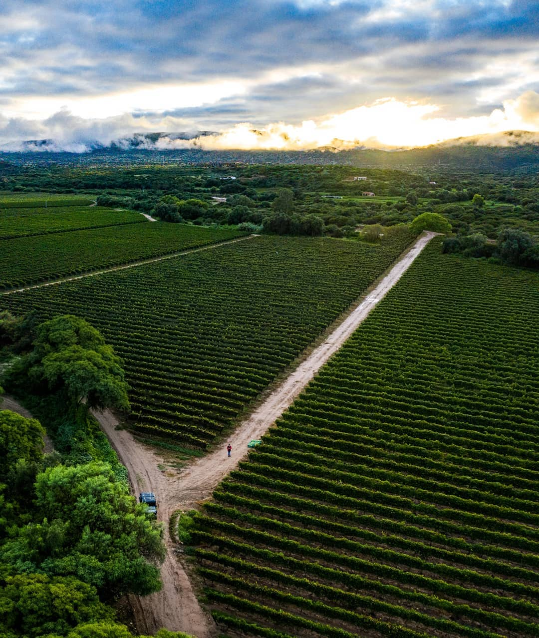 Foto desde un dron en los viñedos de Tarija, Bolivia, durante la época de la vendimia.